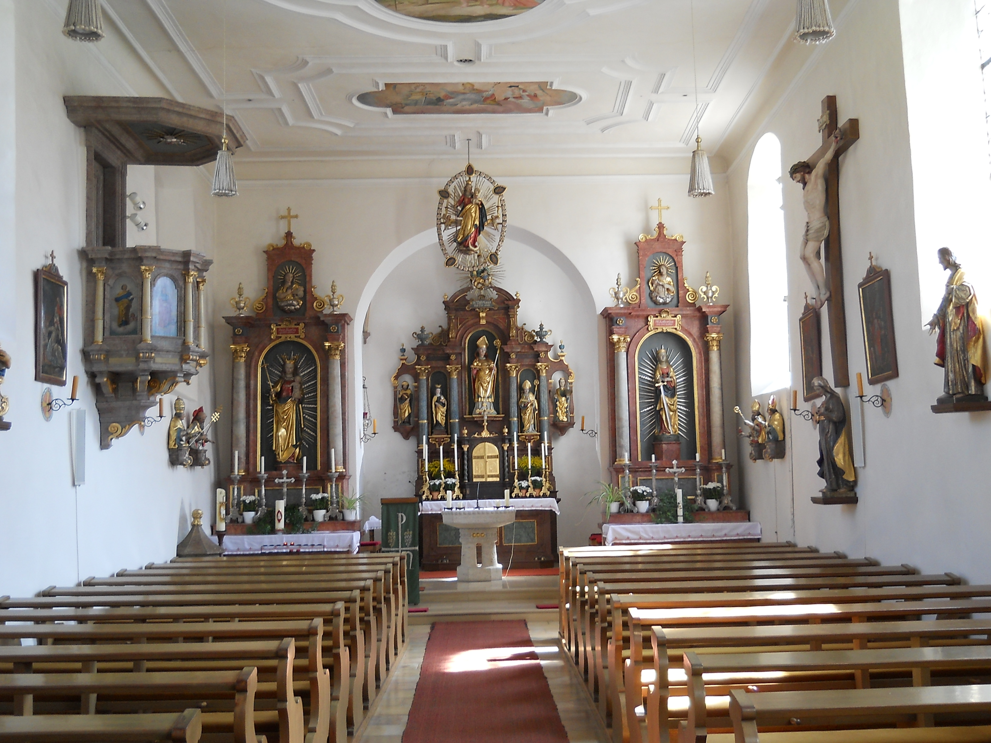 Pfarrkirche von Ochsenfeld, einem Gemeindeteil von Adelschlag im oberbayerischen Landkreis Eichstätt, barockes Inneres